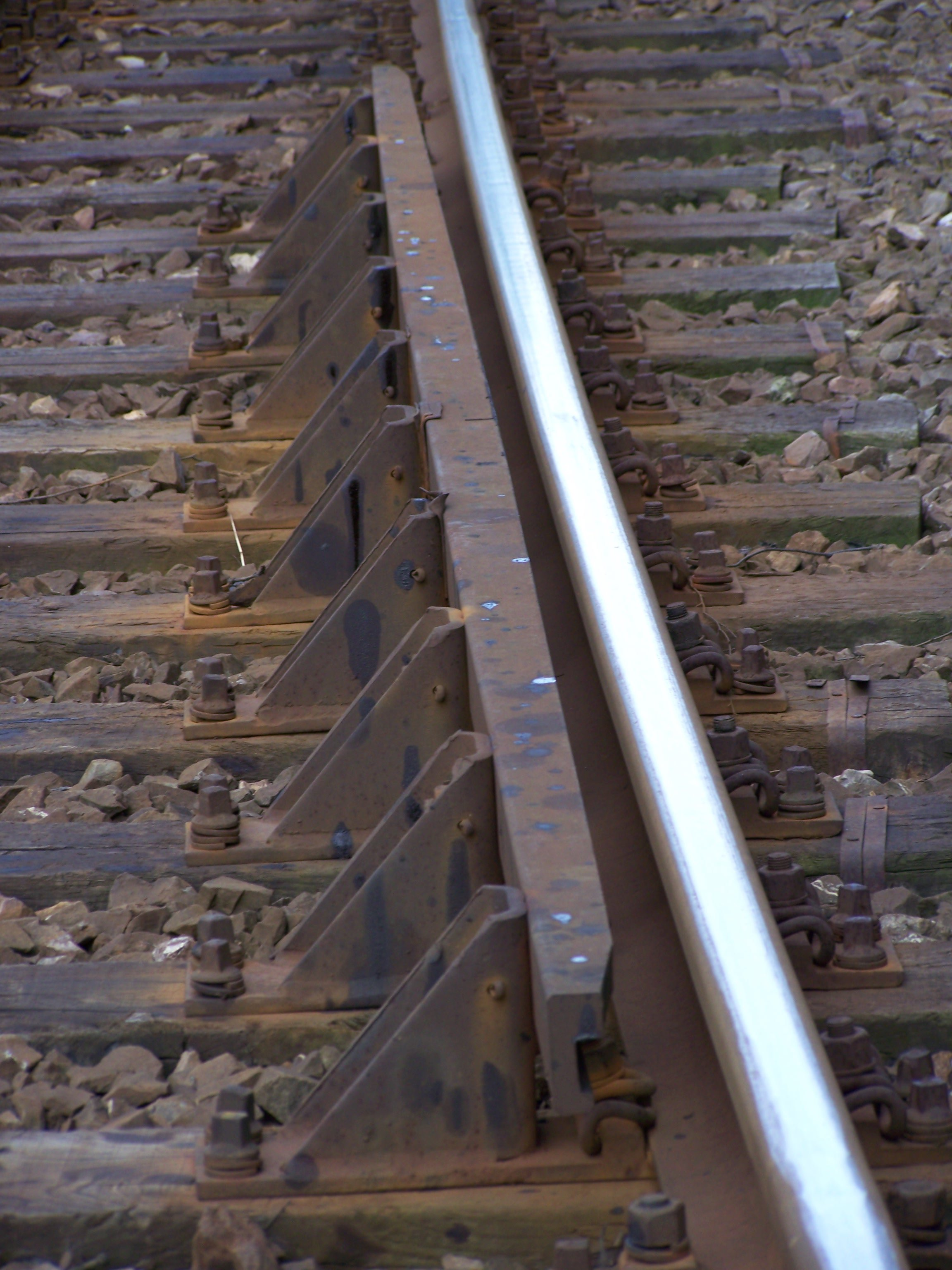 Kierownica na rozjeździe na południowej głowicy stacji kolejowej w Celestynowie.